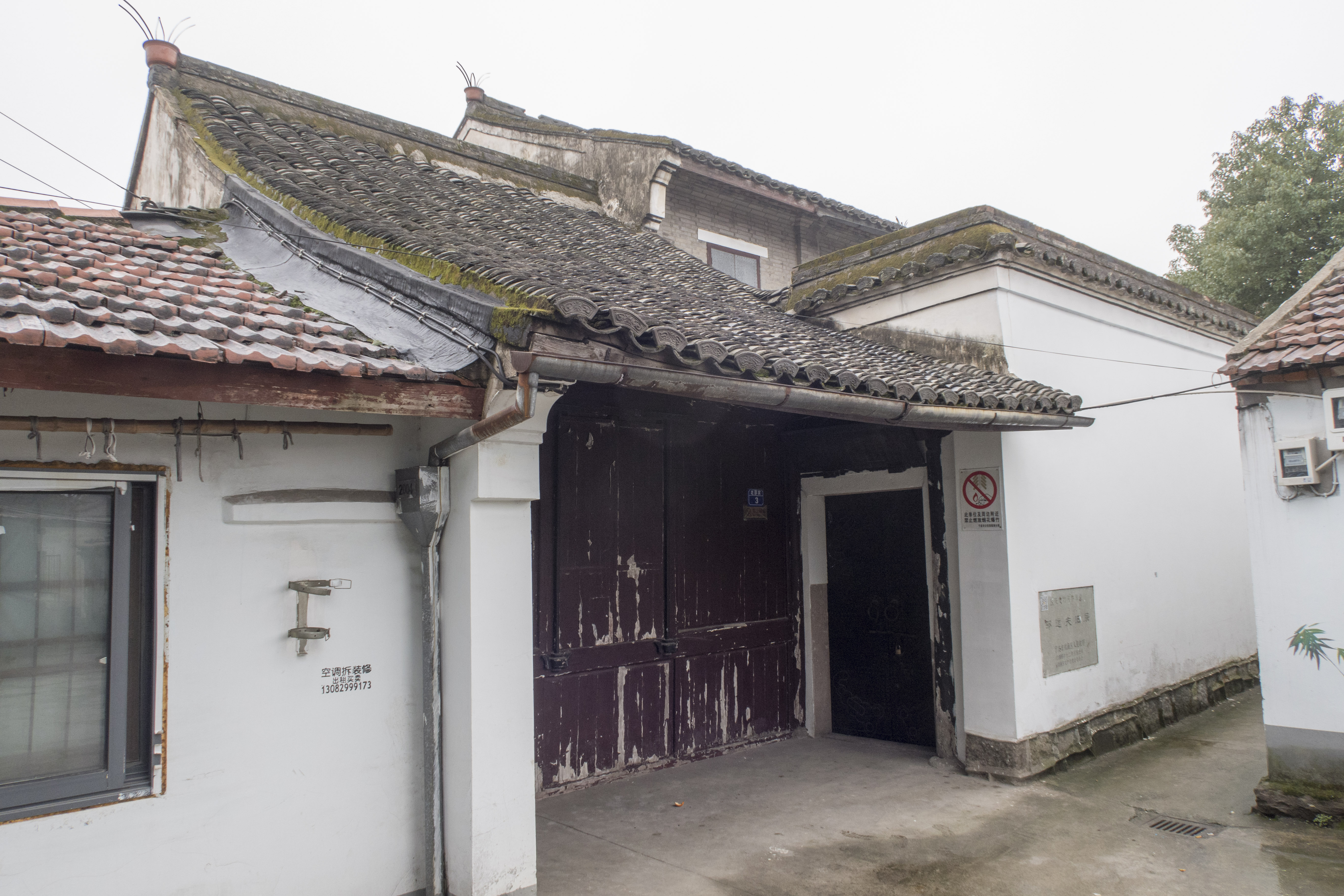 镇海邵逸夫故居